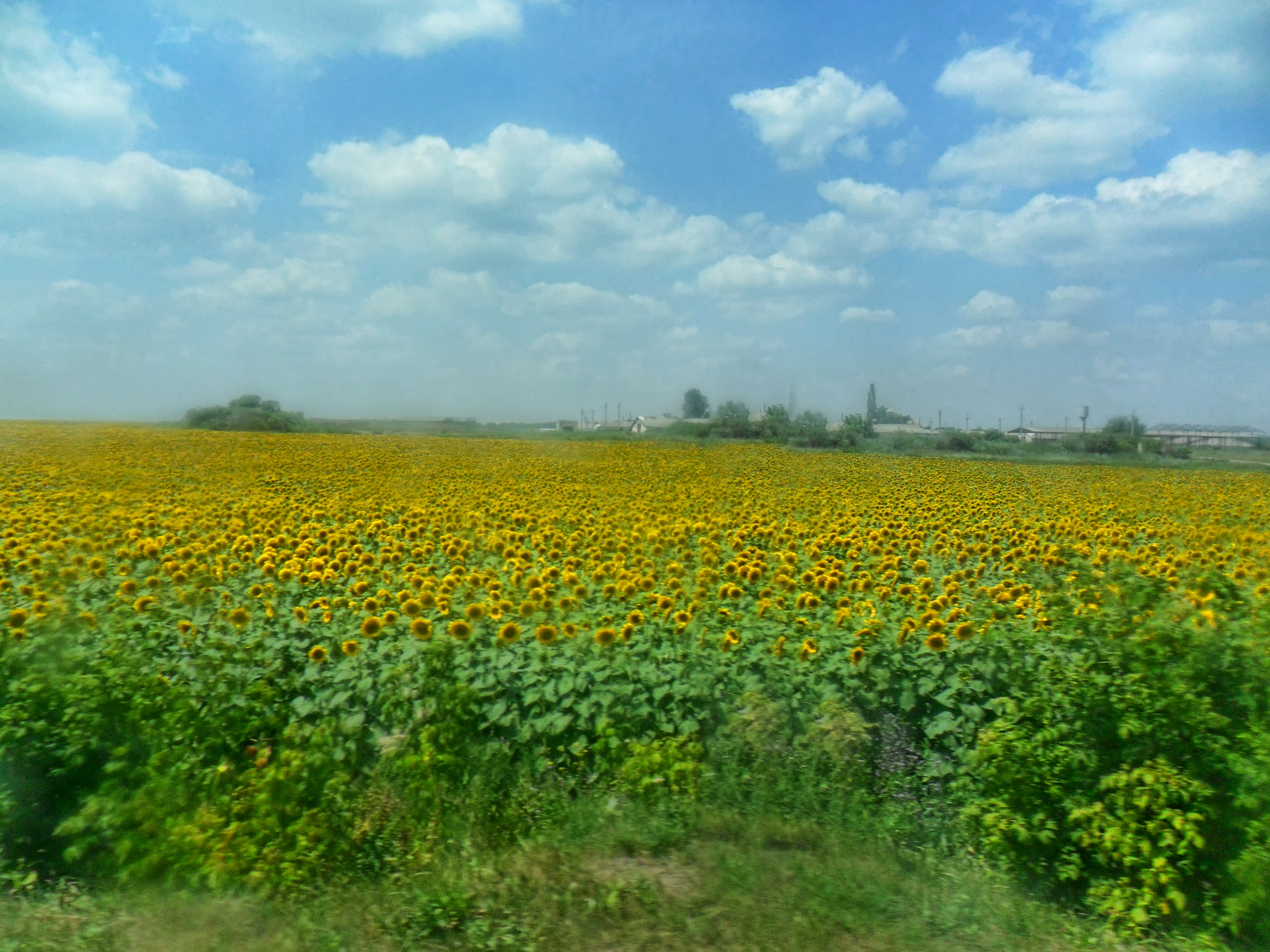 Соняшникове поле. Зіньківський район, Полтавська область